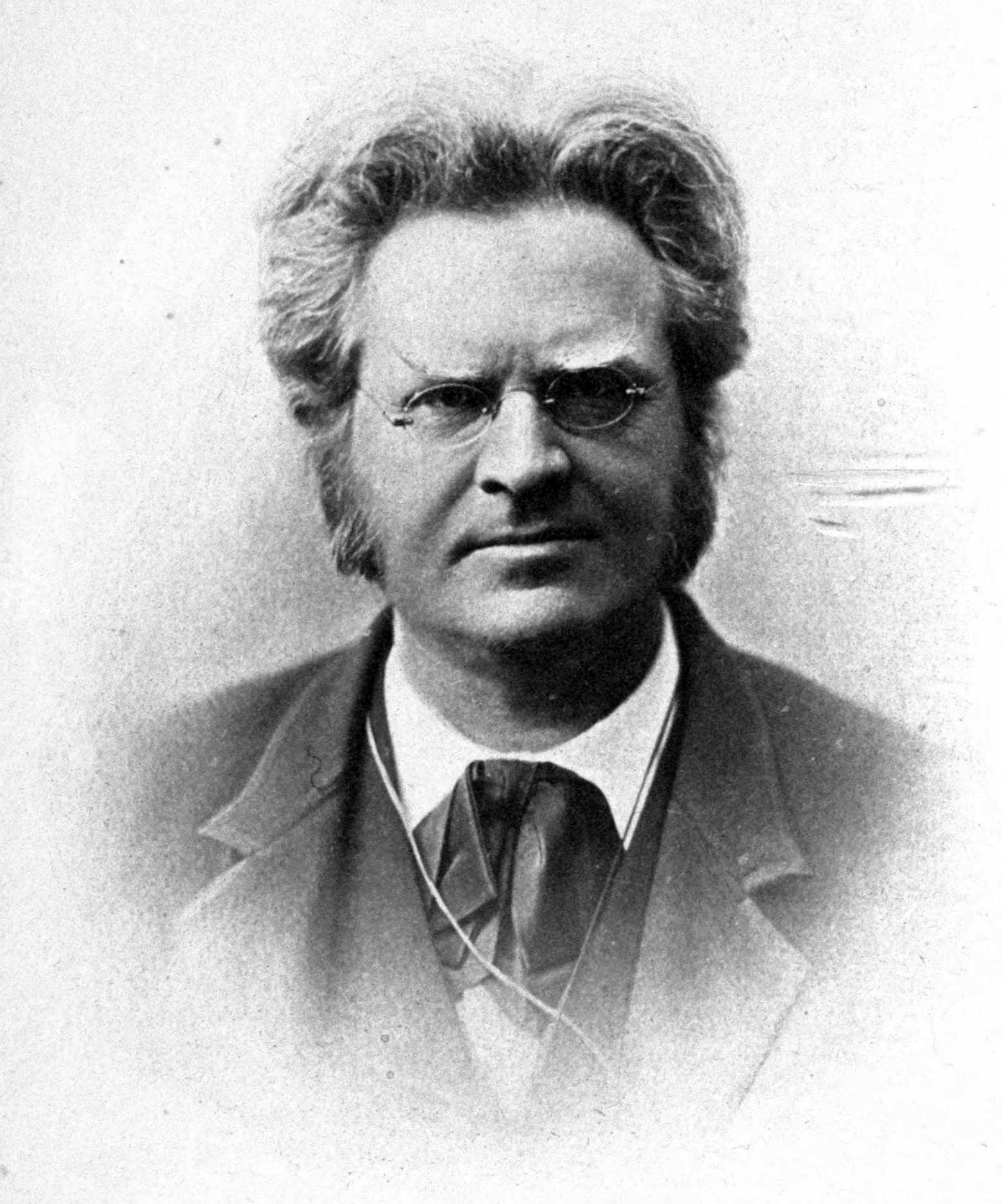 Bjørnstjerne Bjørnson